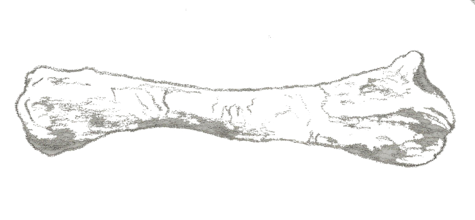 Illustration of a fossil of Chienkosaurus